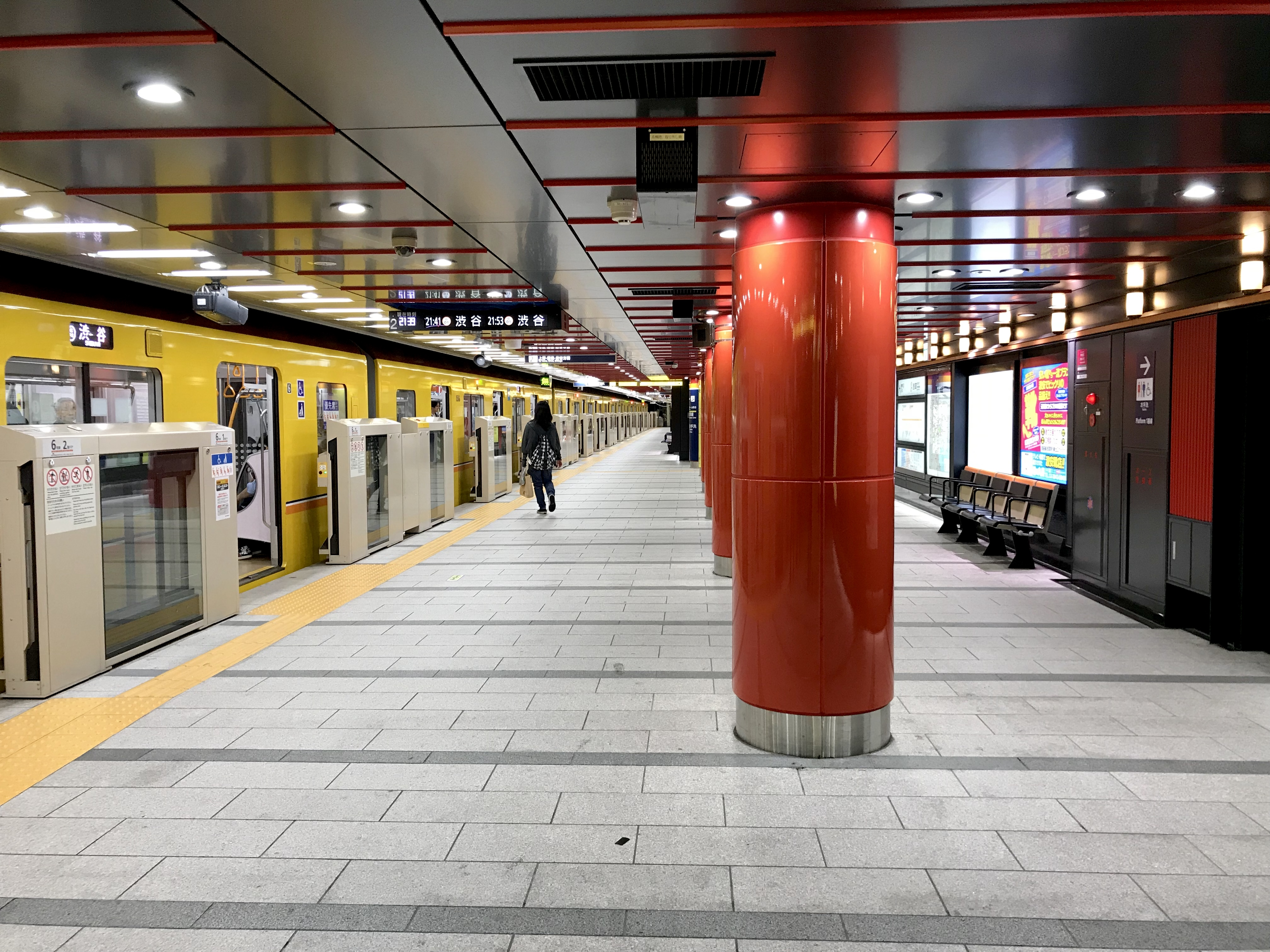 東京メトロ銀座線浅草駅2番ホーム（リニューアル後）